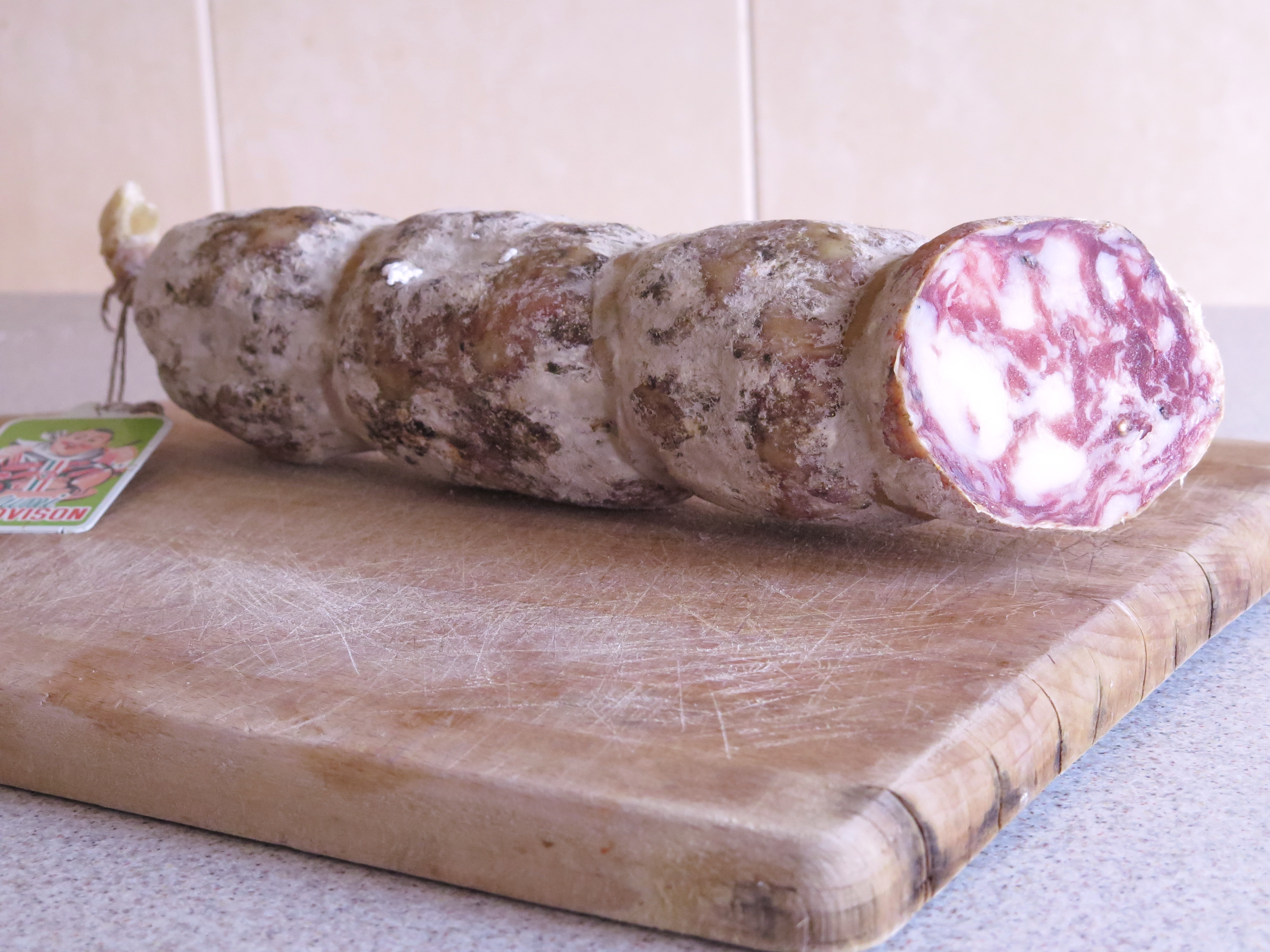 Salame friulano punta di coltello